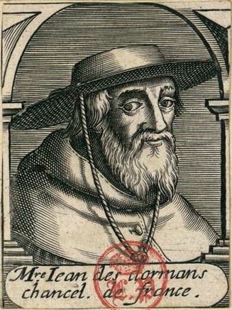 Jean de Dormans, chancelier de France